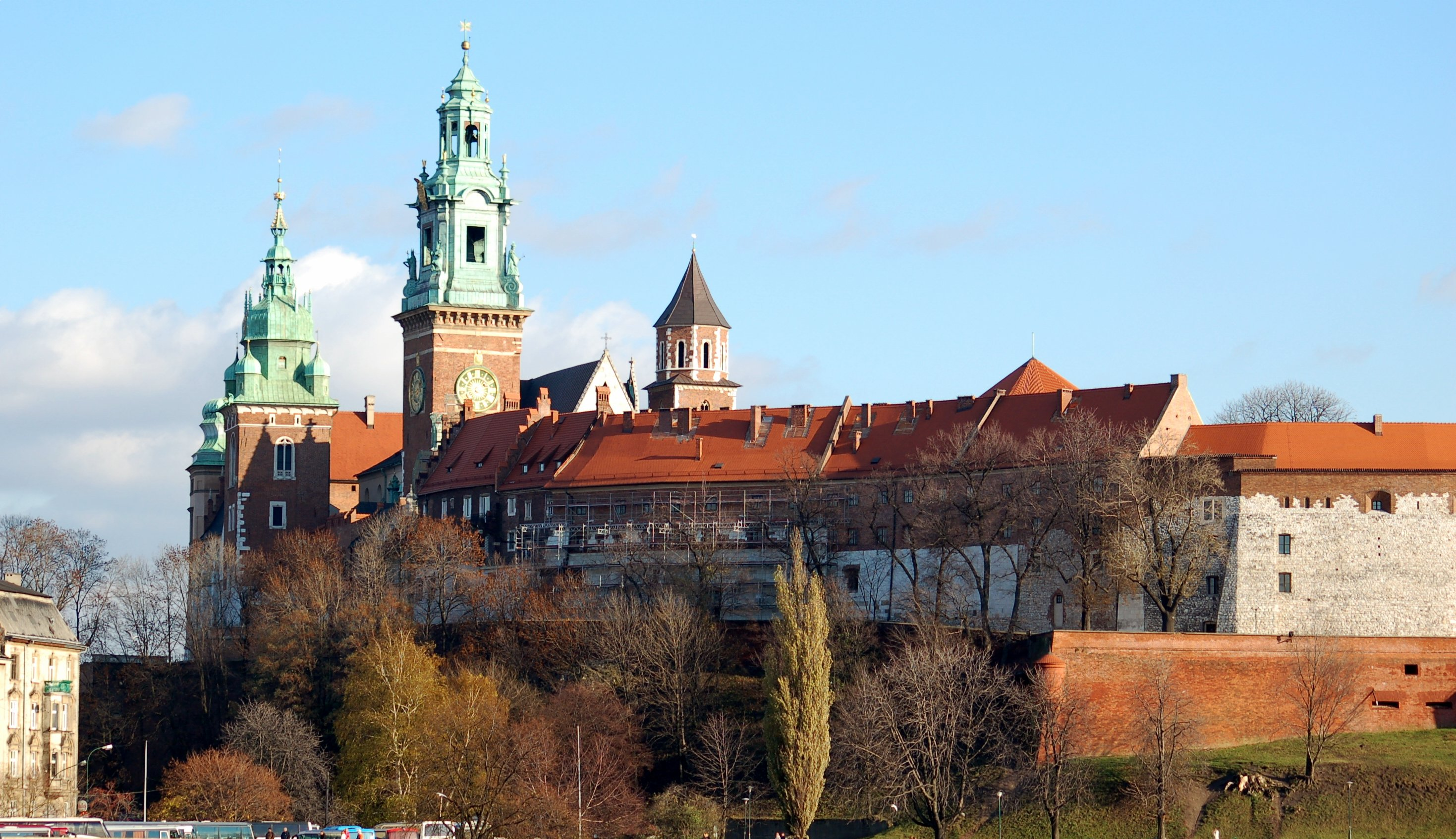 Wawel in Kraków, Poland